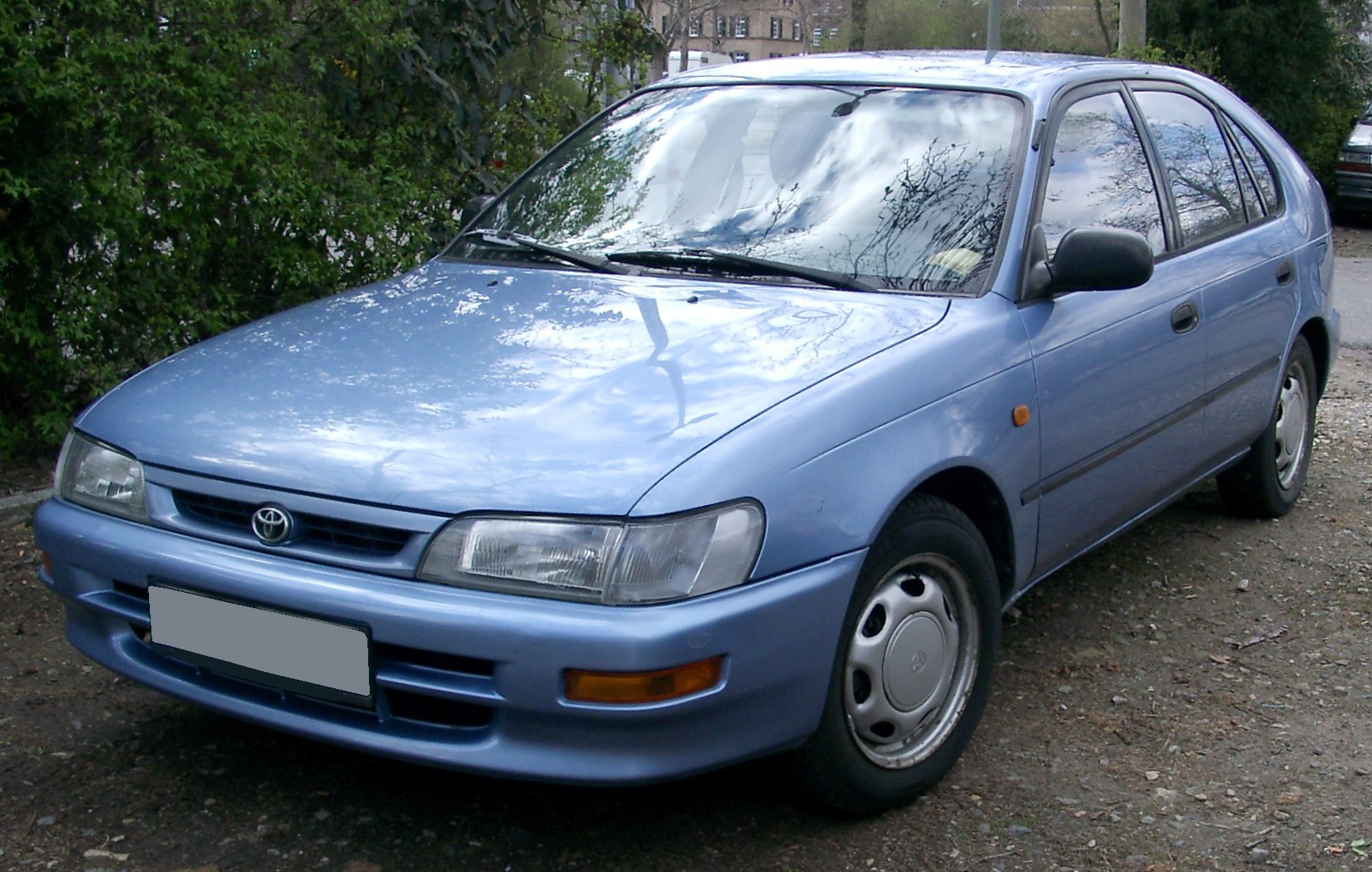 Toyota Corolla E100